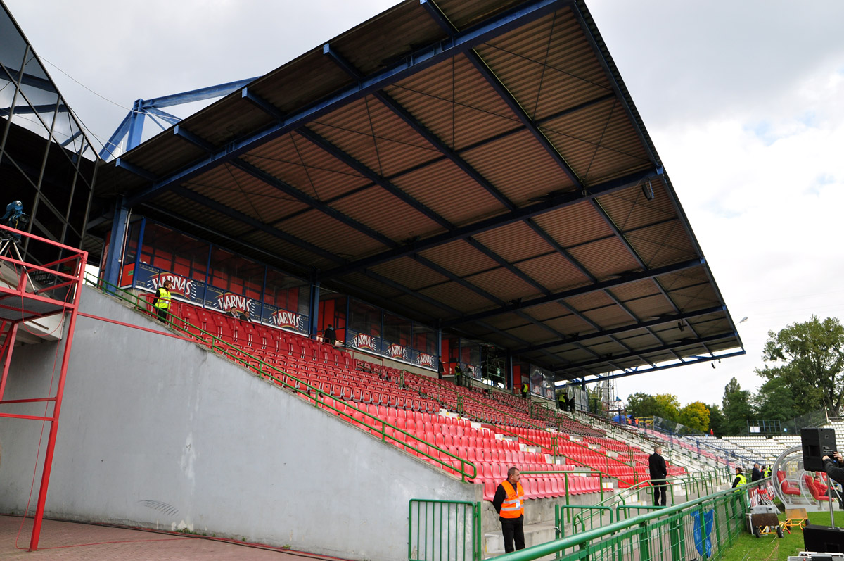 Stary stadion Widzewa Łódź - trybuna A